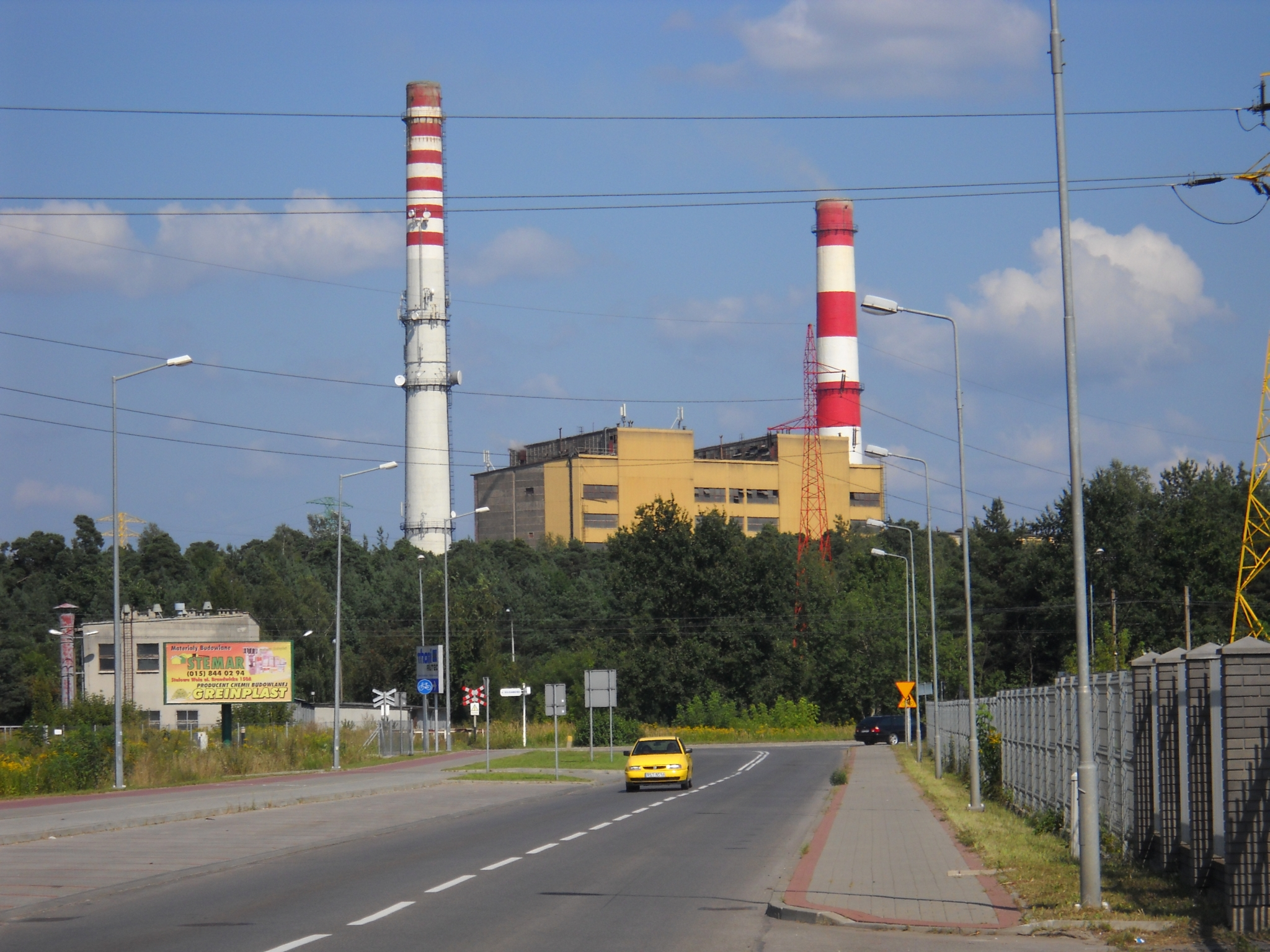 Widok na Elektrownie Stalowa Wola z ul. Grabskiego